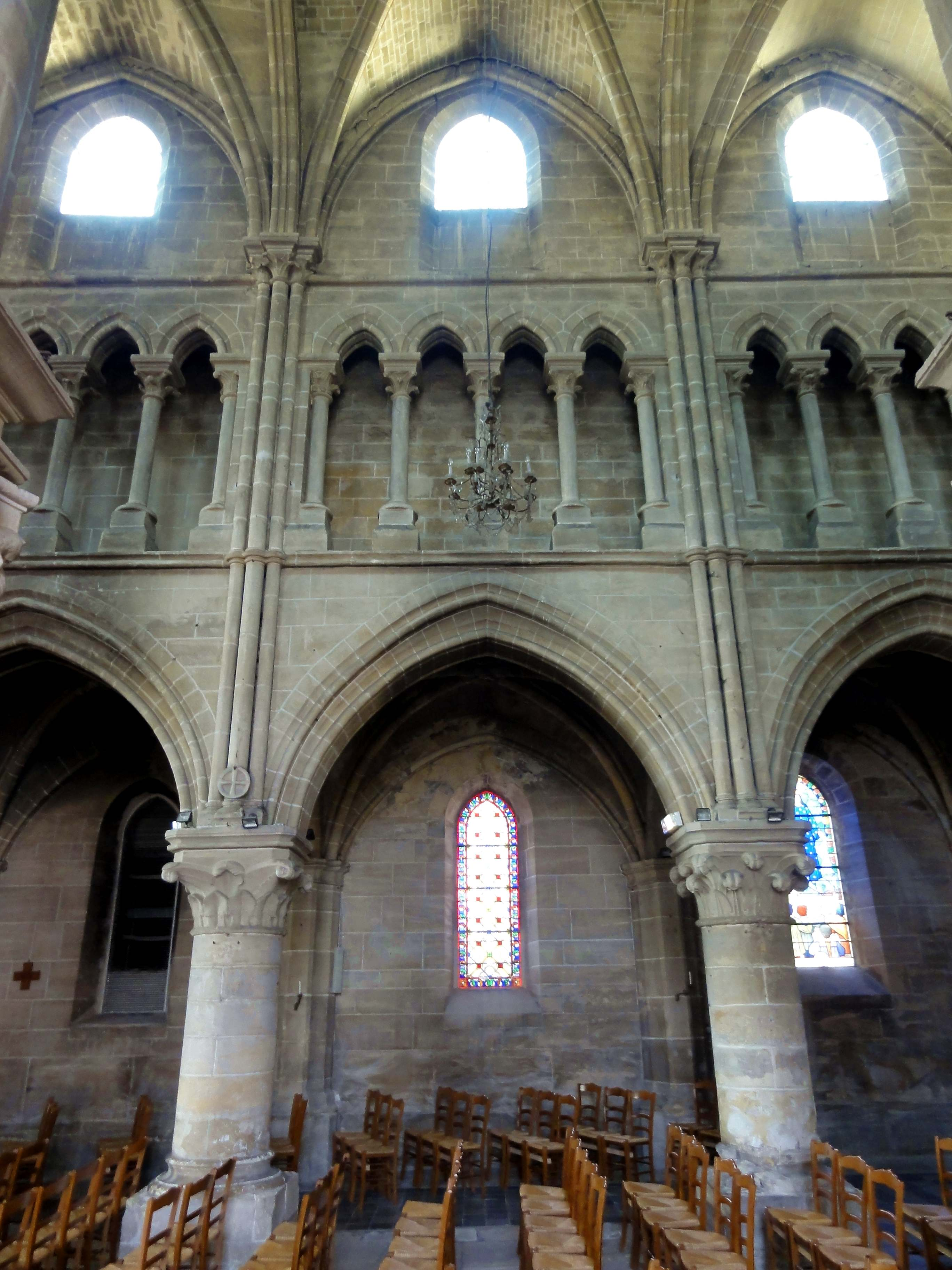 Intérieur de l'église - voir titre.